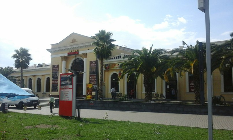 Старое здание вокзала Адлер.